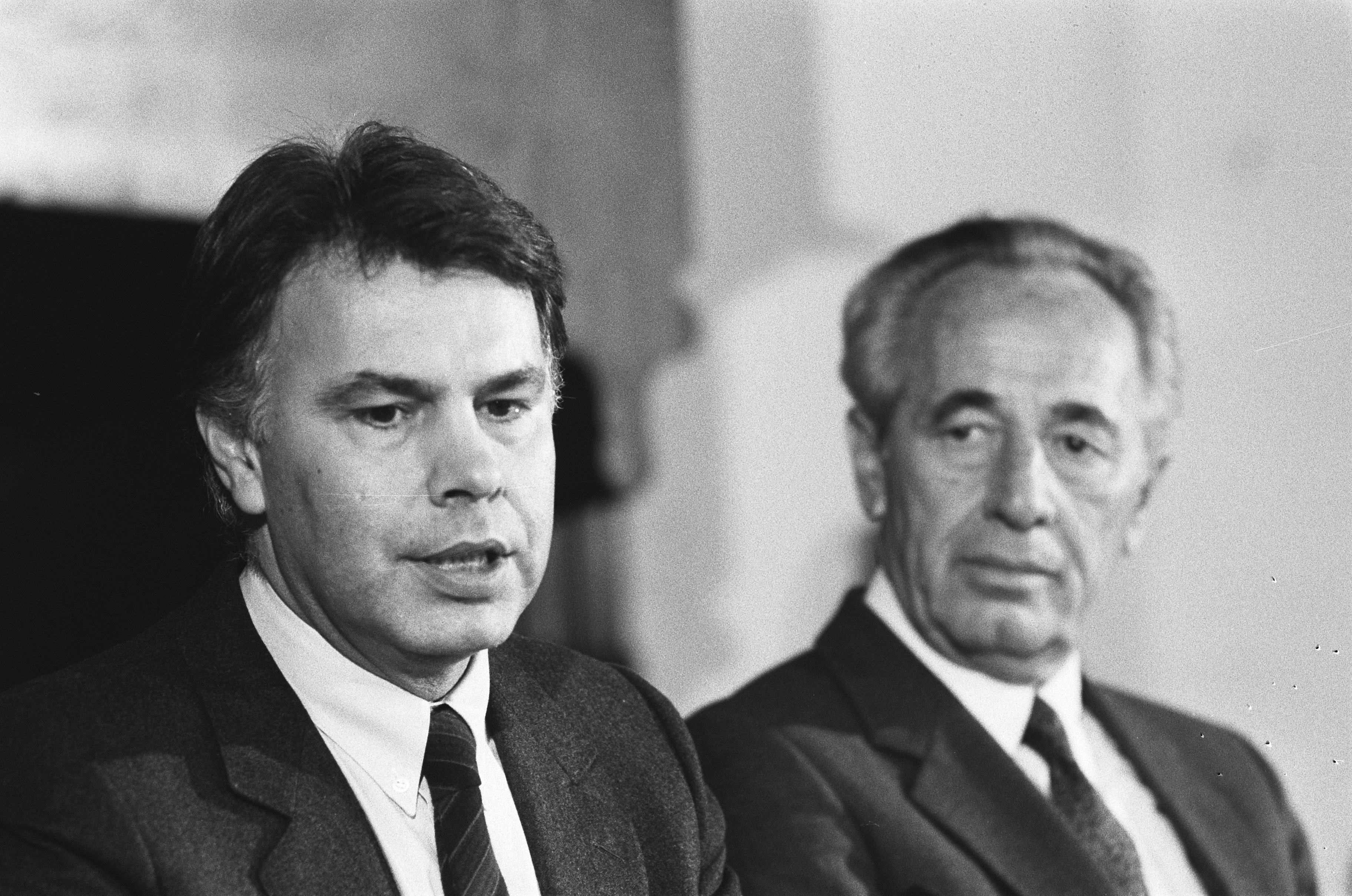 Peres (rechts) en Gonzalez (links) 19 januari 1986